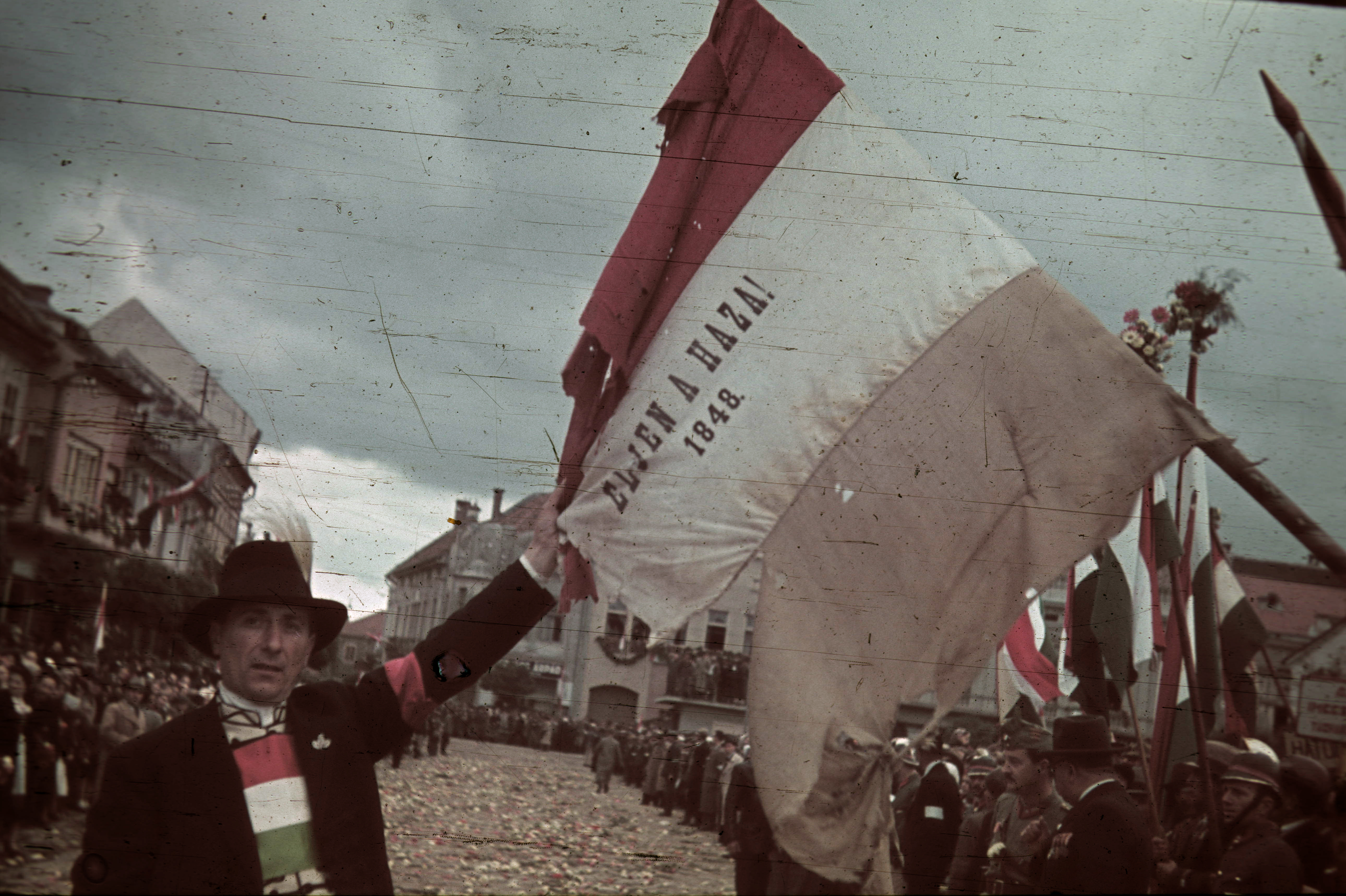 Kézdivásárhely, Gábor Áron tér a magyar csapatok bevonulása idején. A felvétel 1940. szeptember 13-án készült Location: Romania, Transylvania, Targu Secuiesc Tags: colorful, flag, territorial gain Title: Gábor Áron tér a magyar csapatok bevonulása idején. A felvétel 1940. szeptember 13-án készült